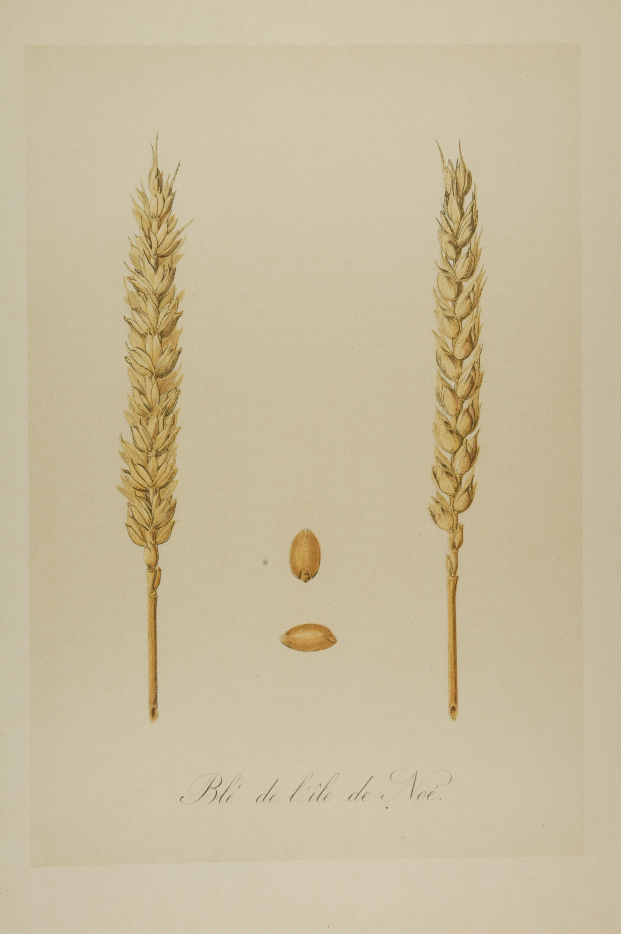 Blé de l'île de Noé